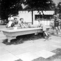 Bundesgartenschau 1957 in Köln - Wasserbecken im Kindergarten